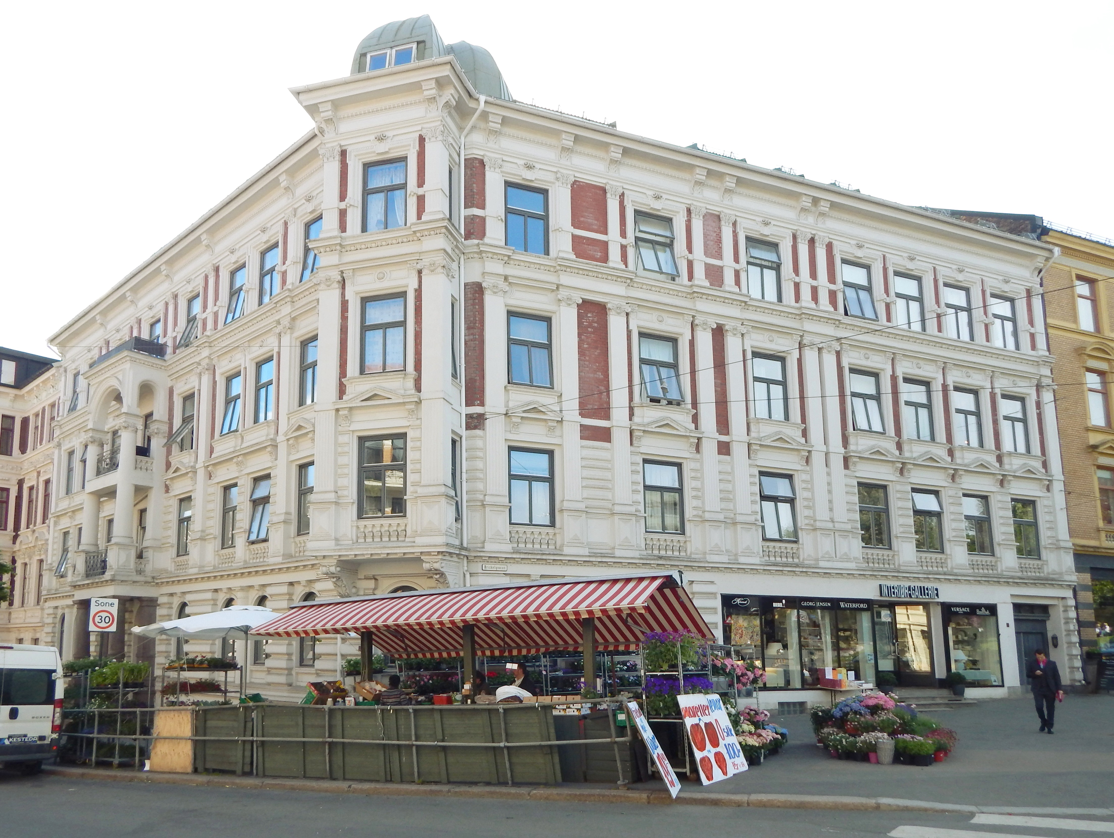 Briskebyveien 2